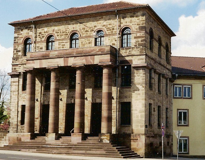 Torwache in Kassel, Jussow 1805